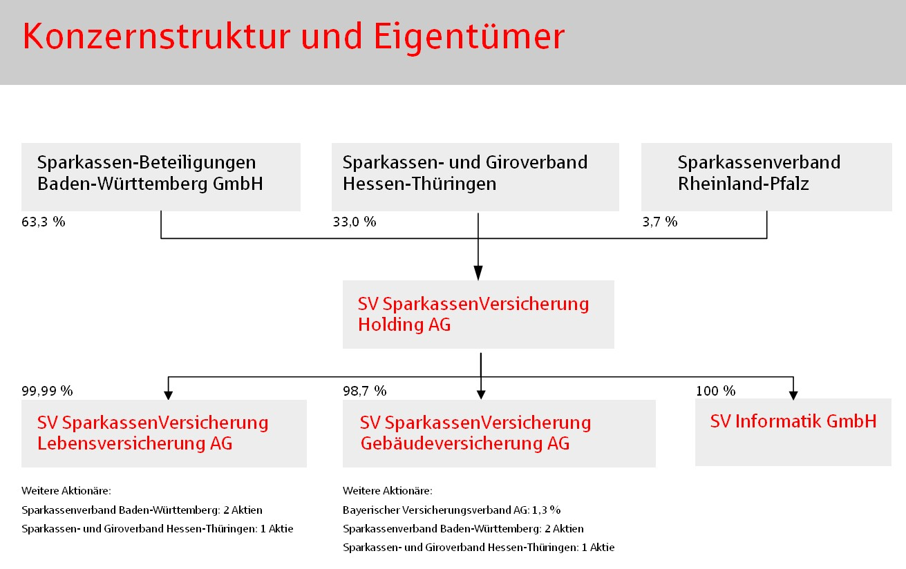 Konzernstruktur und Eigentümer der SV SparkassenVersicherung